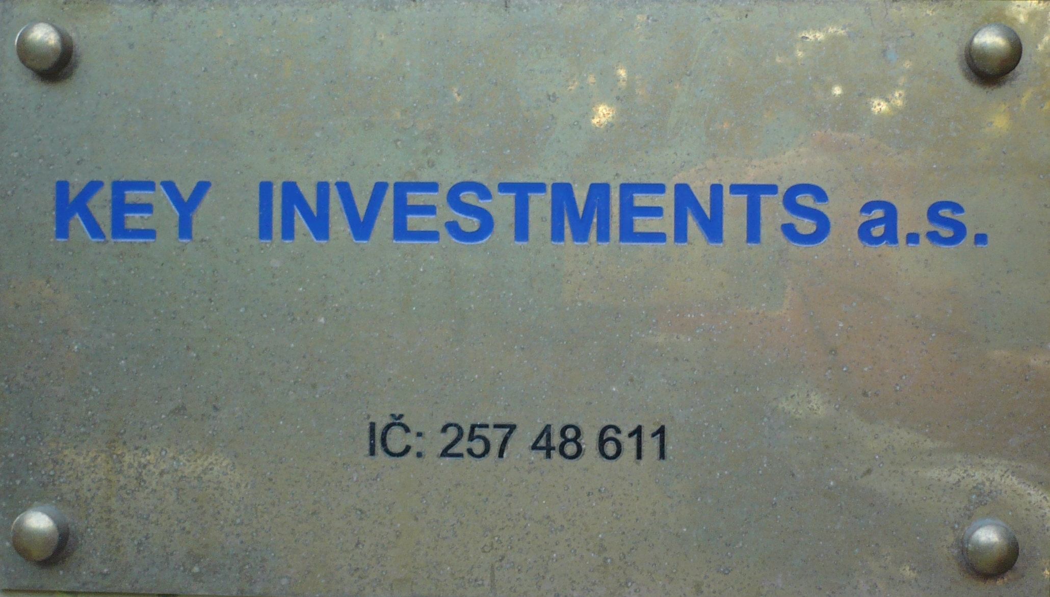 Key Investments, Washingtonova 17, Praha (11. listopadu 2014 byla tato fotografie použita vydavatelstvím MAFRA v on-line verzi článku Ve Via Chemu zbylo půl miliardy)